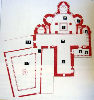 Planta del monestir de Sant Joan de les Abadesses (Barcelona, Espanya) Layout from monestry of Sant Joan de les Abadesses (Ripoll, Barcelona, Spain) art romànic - románic - romanesque monestir - monasterio - monestry